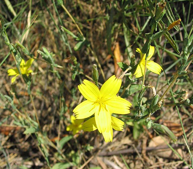 Original description: Lactuca viminea (laitue des vignes) Photo prise à Ille-sur-Têt en juillet 2004